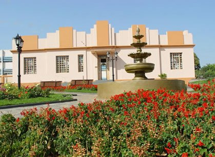 Uma foto do museu Cornélio Ramos, em Catalão, Goiás